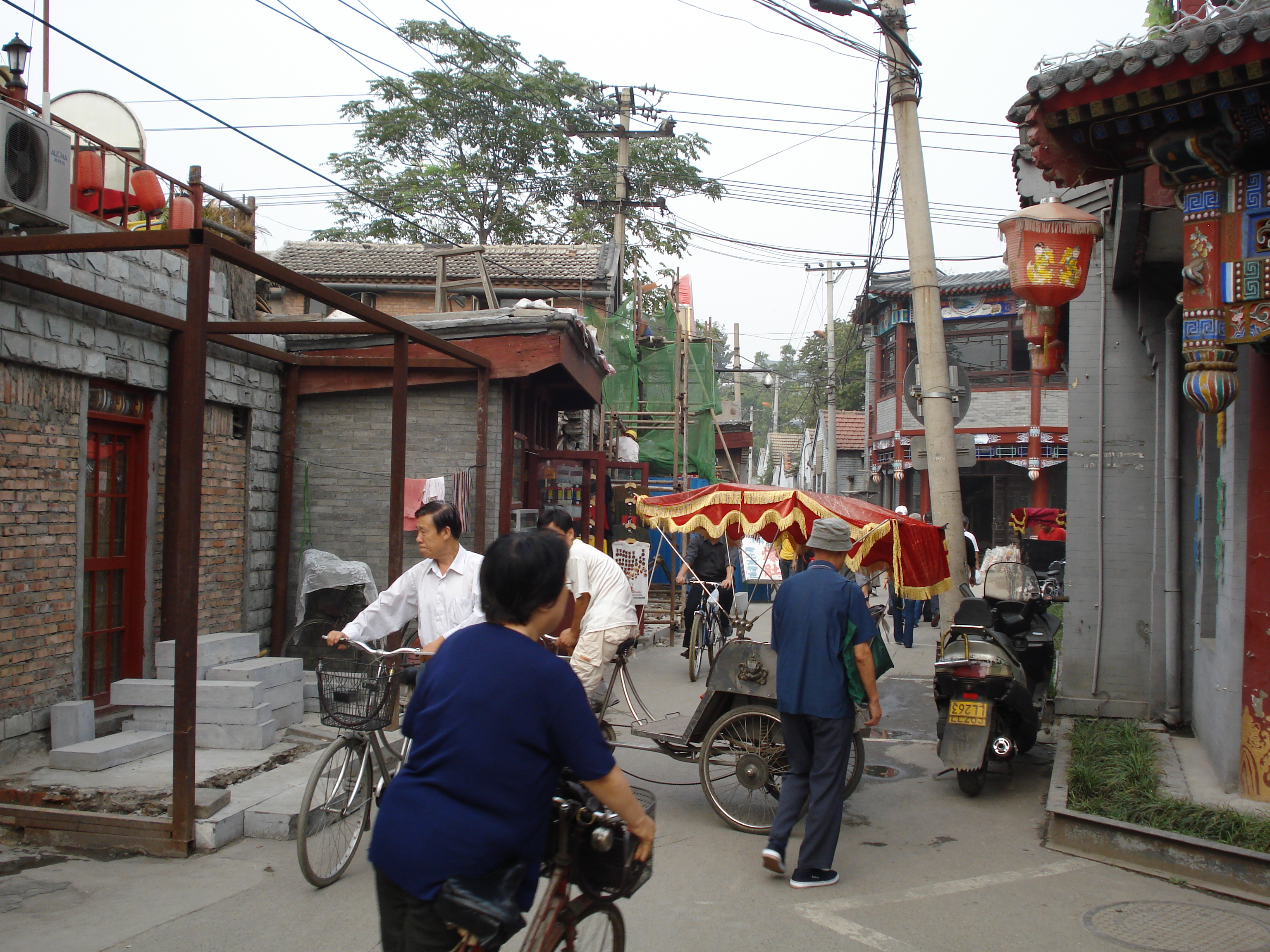 hutong in Bejing